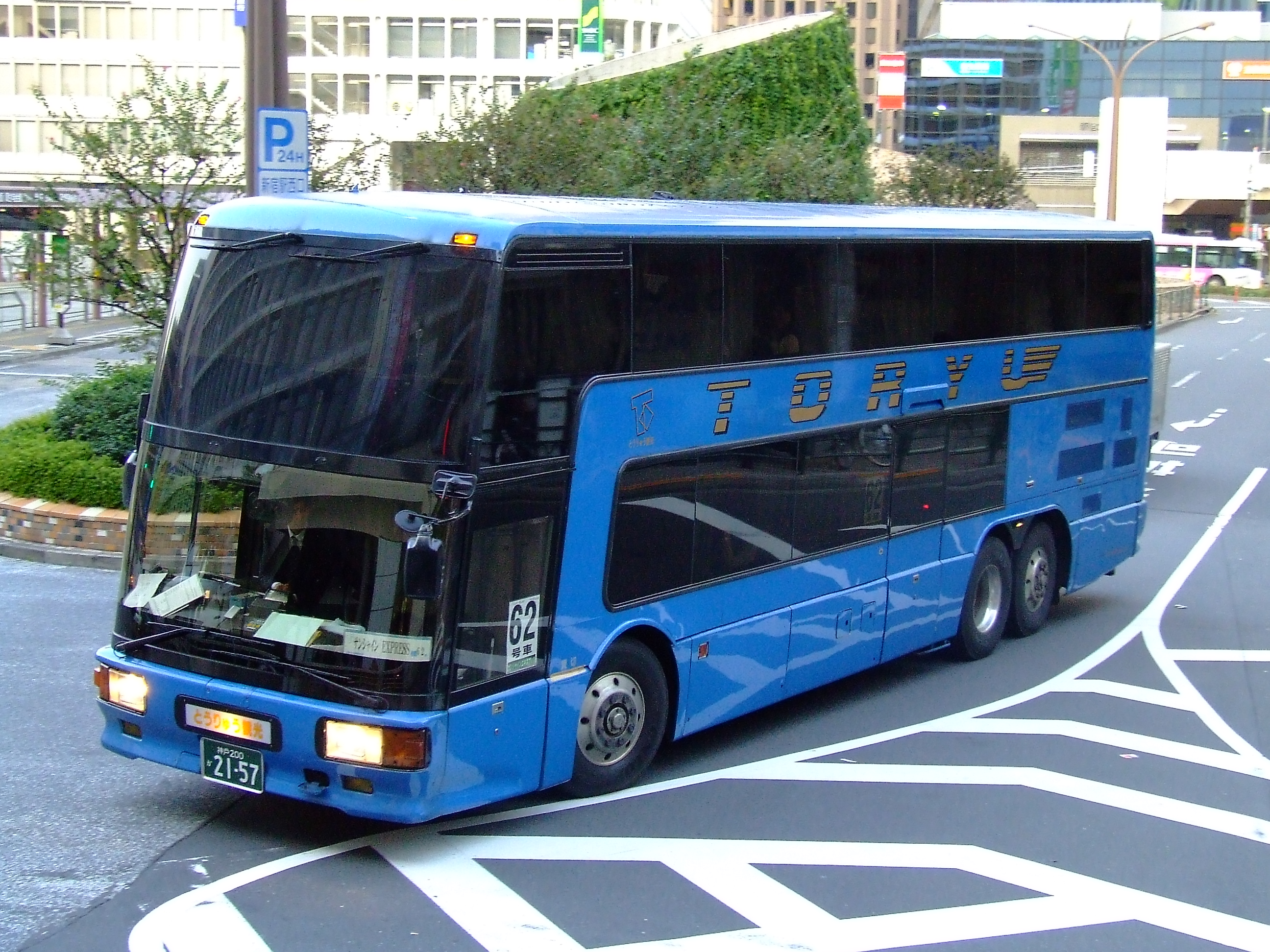 とうりゅう観光（土江産業）が所有するエアロキング。主に関西～関東間ツアーバスに使用される。